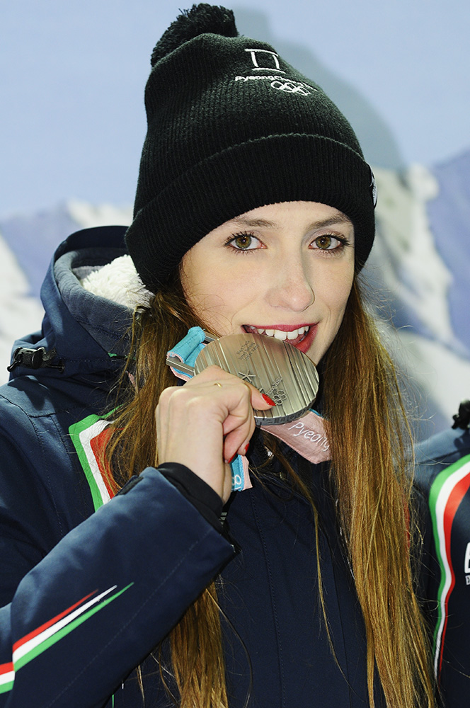 Martina Valcepina con il suo argento olimpico.